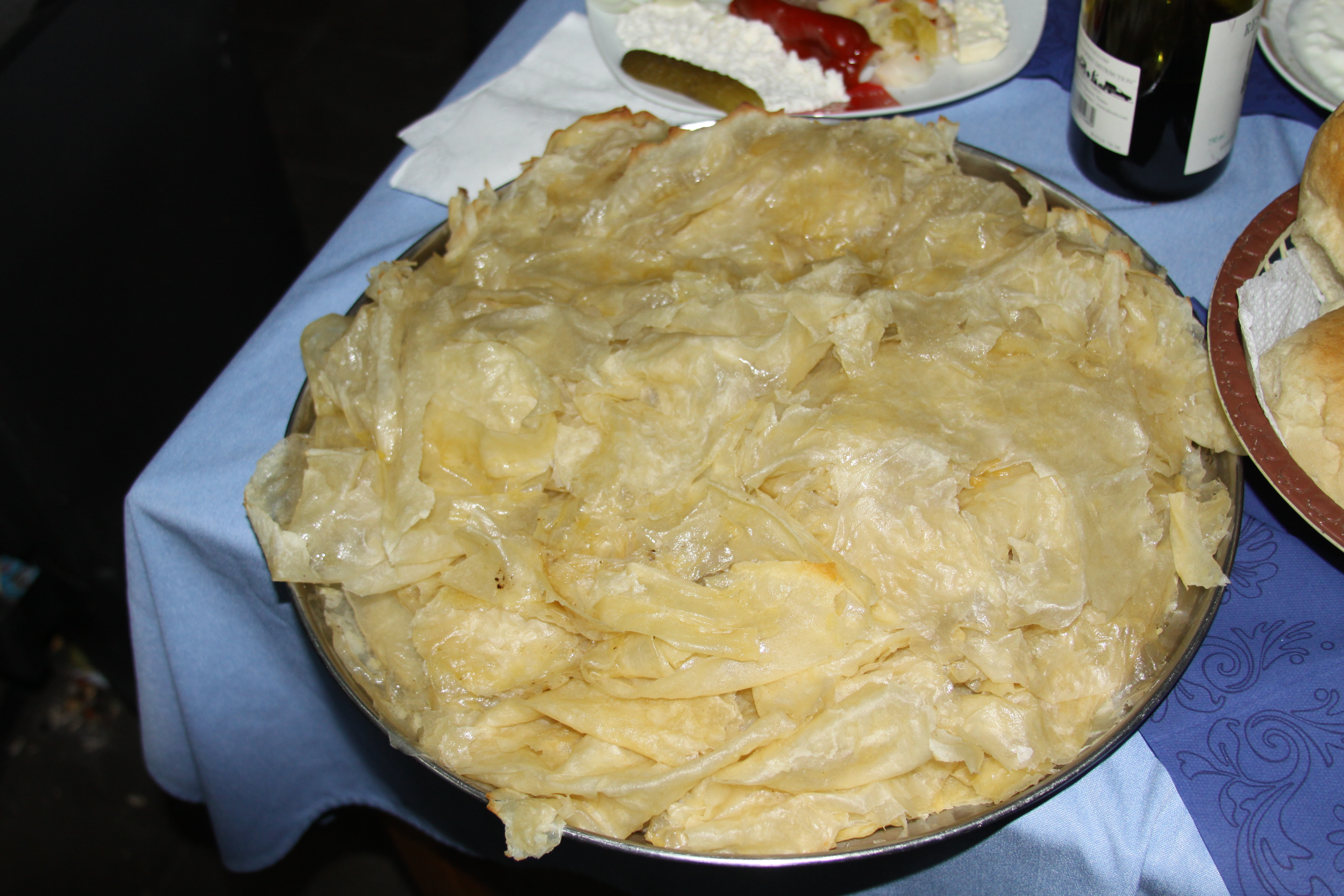 Gatimi vendas i Gorës